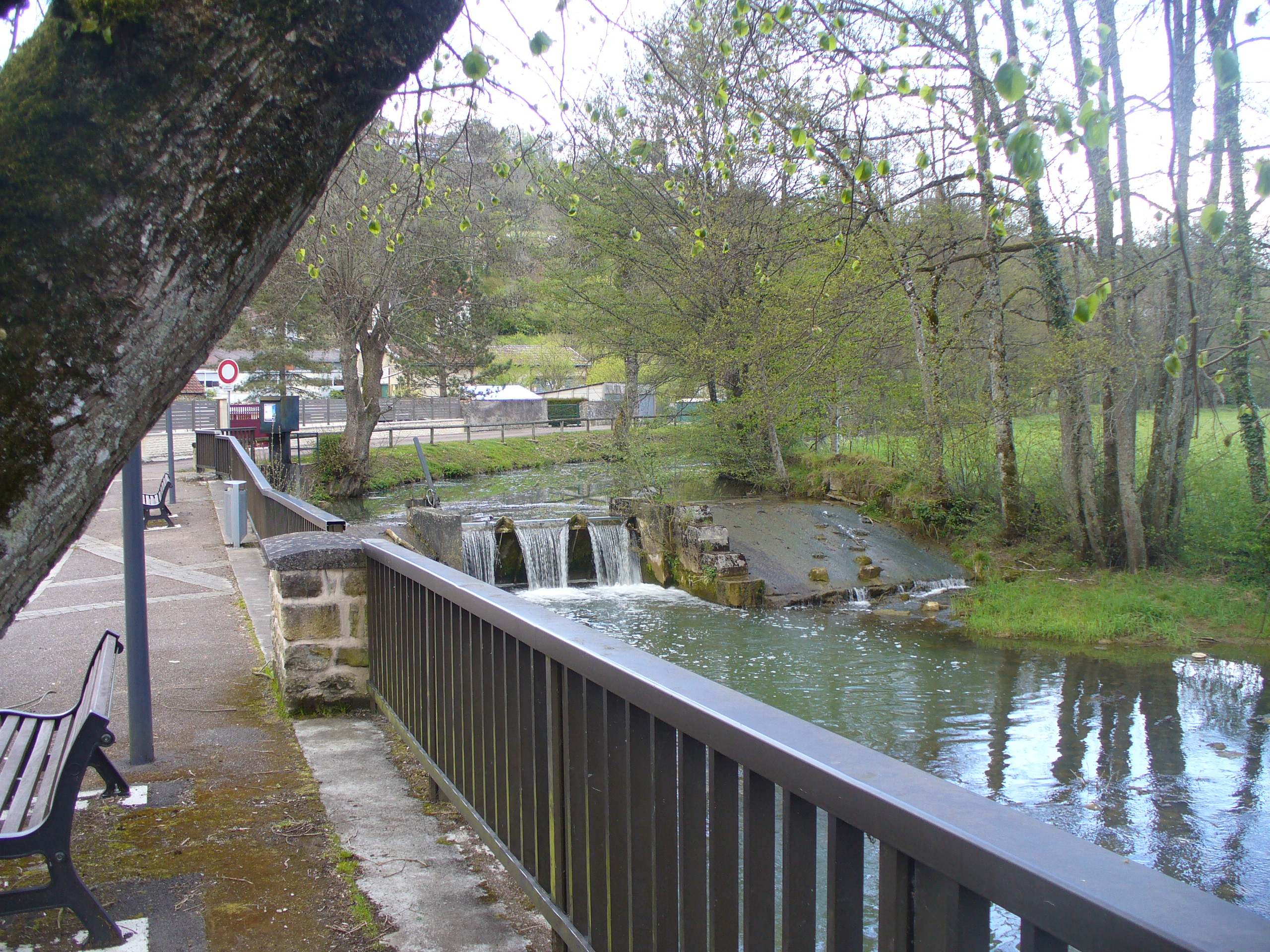 Photographie de La Traire prise depuis Nogent dit le-Bas (Haute-Marne) sur la rive droite.